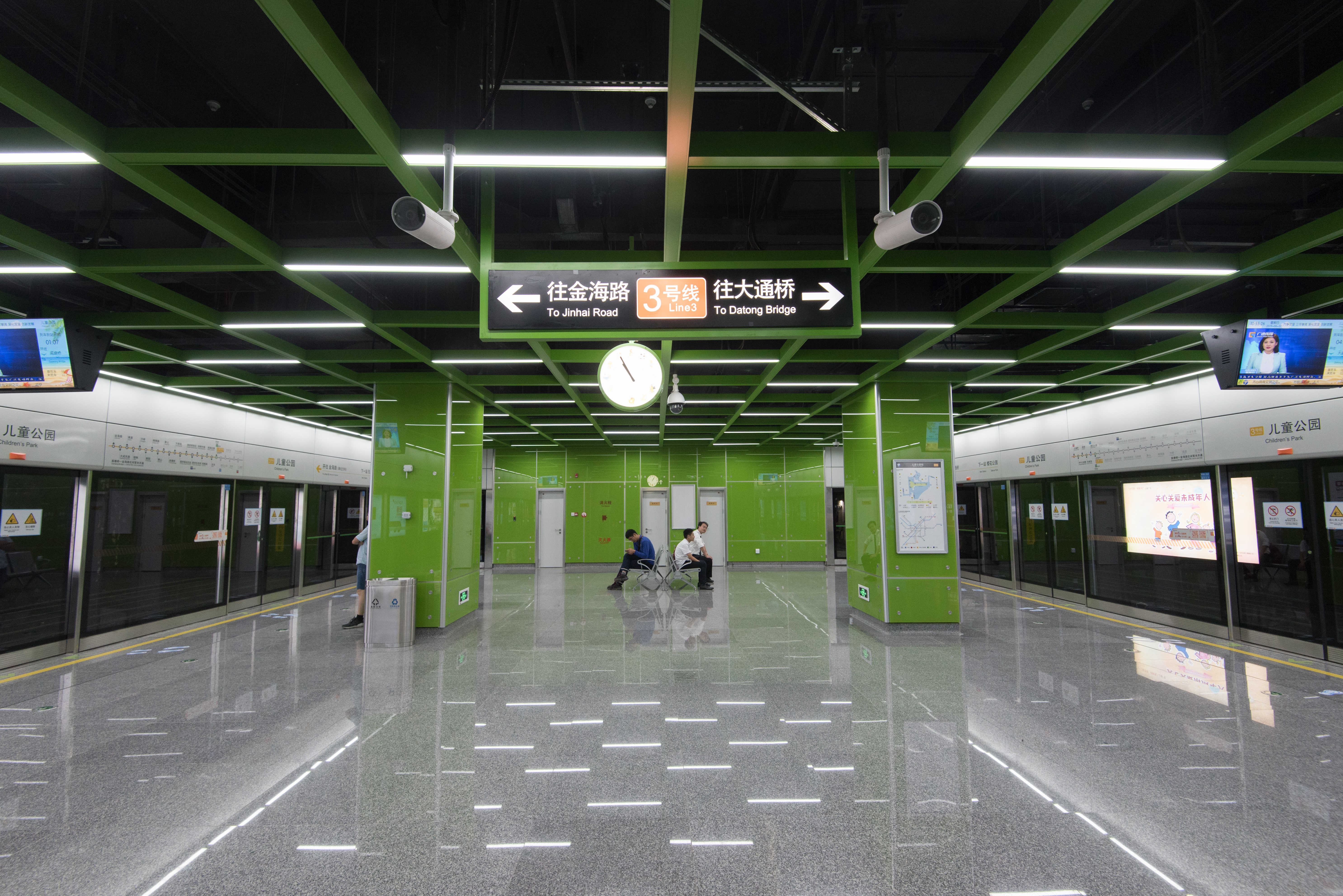 宁波地铁儿童公园站